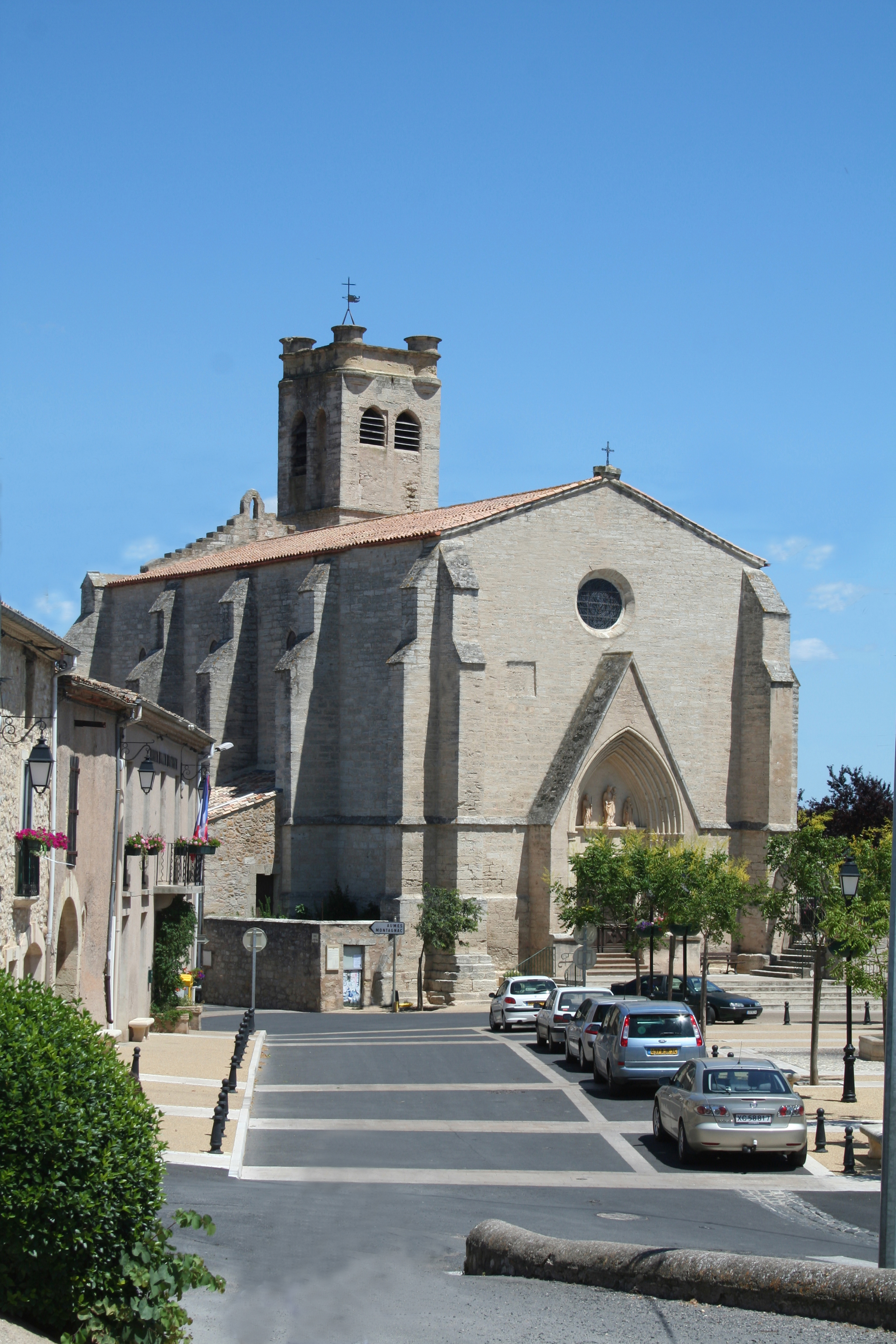 Castelnau-de-Guers (Hérault)- vue générale de l'église Saint-Sulpice.